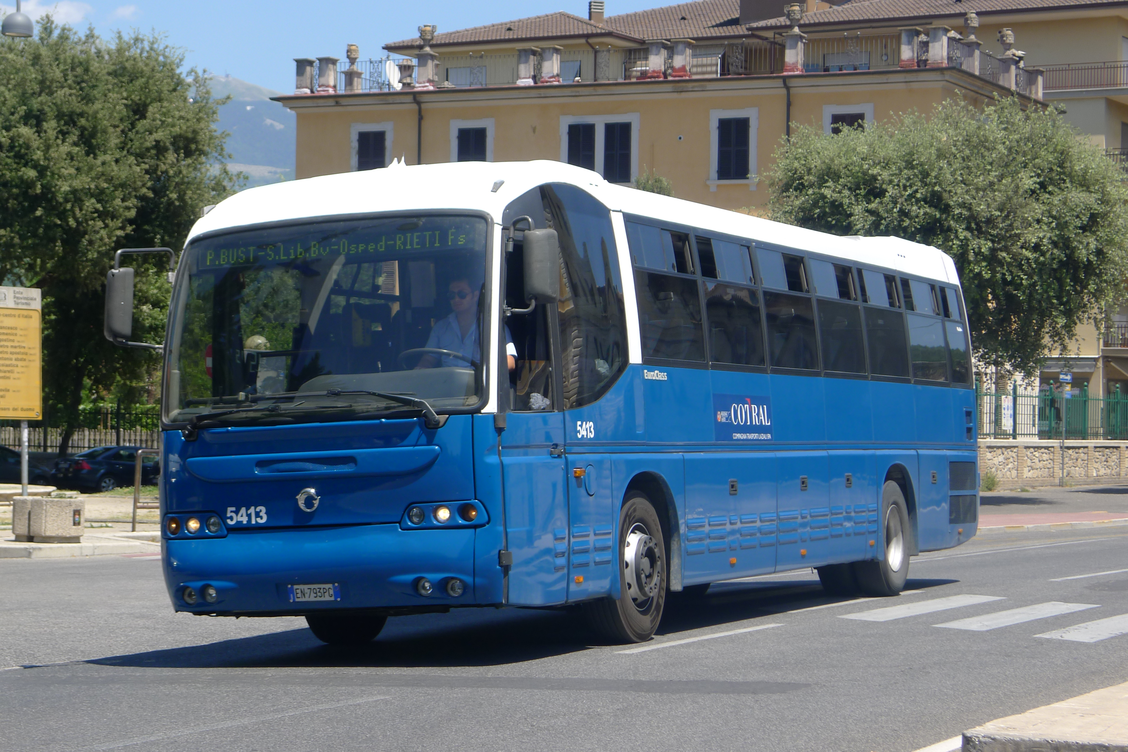 bus EuroClass 389, matricola 5413 COTRAL, targa EN793PG, sulla linea Poggio Bustone-Rieti